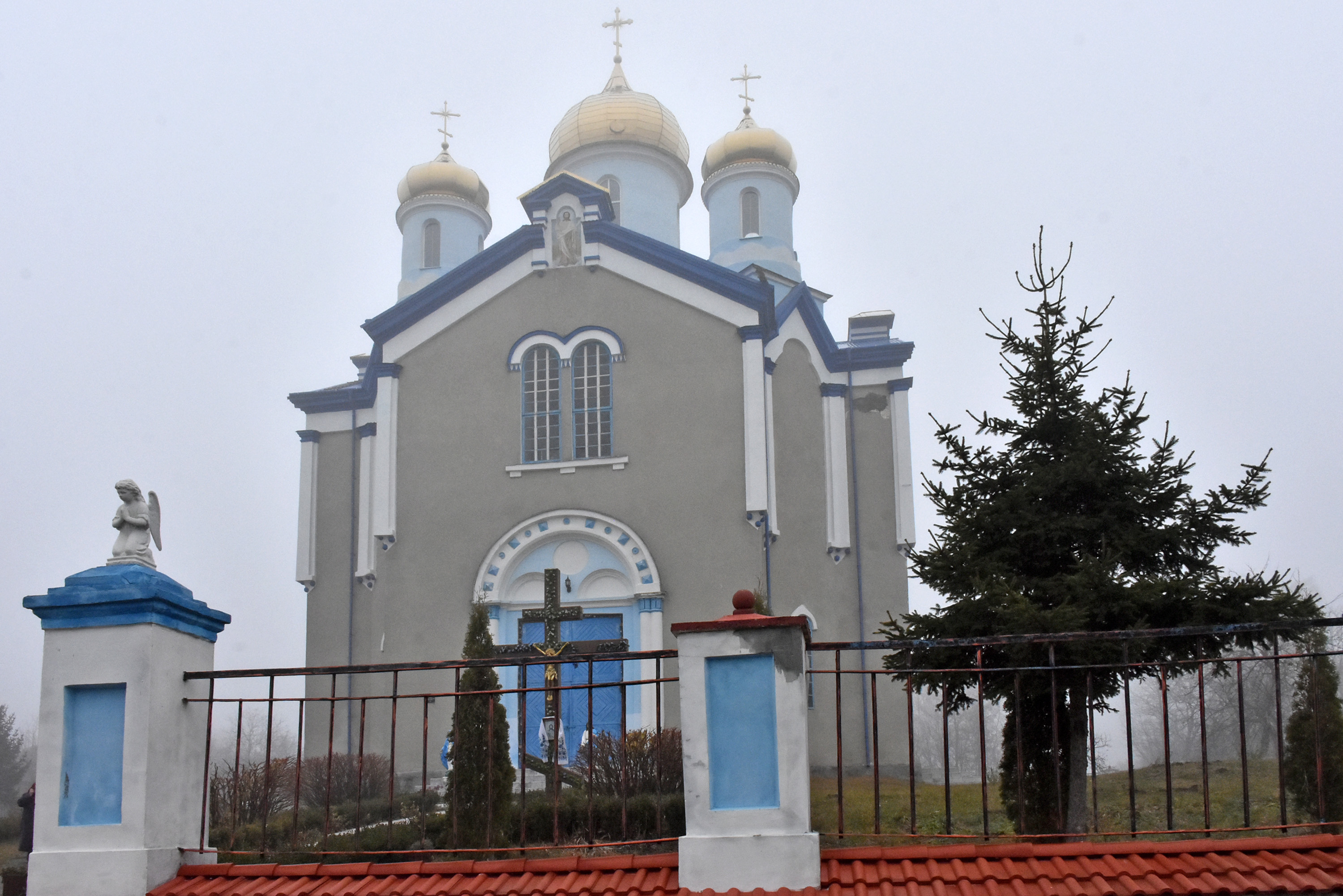 Церква Воскресіння Христового в селі Лопушне Лановецького району Тернопільської області (Україна); 1850 рік.